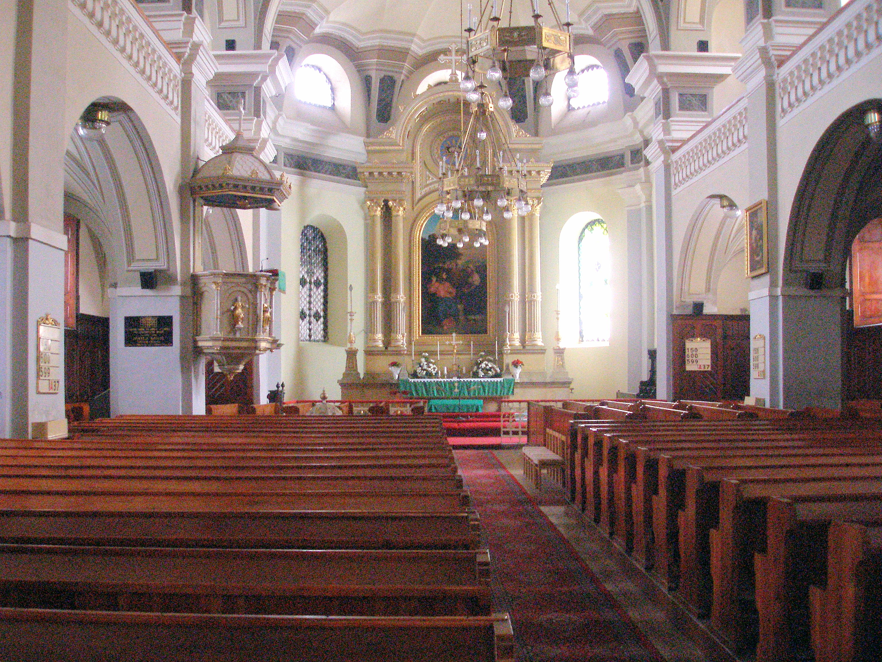 Interiér evanjelického Chrámu svätej Trojice.Mesto Prešov.